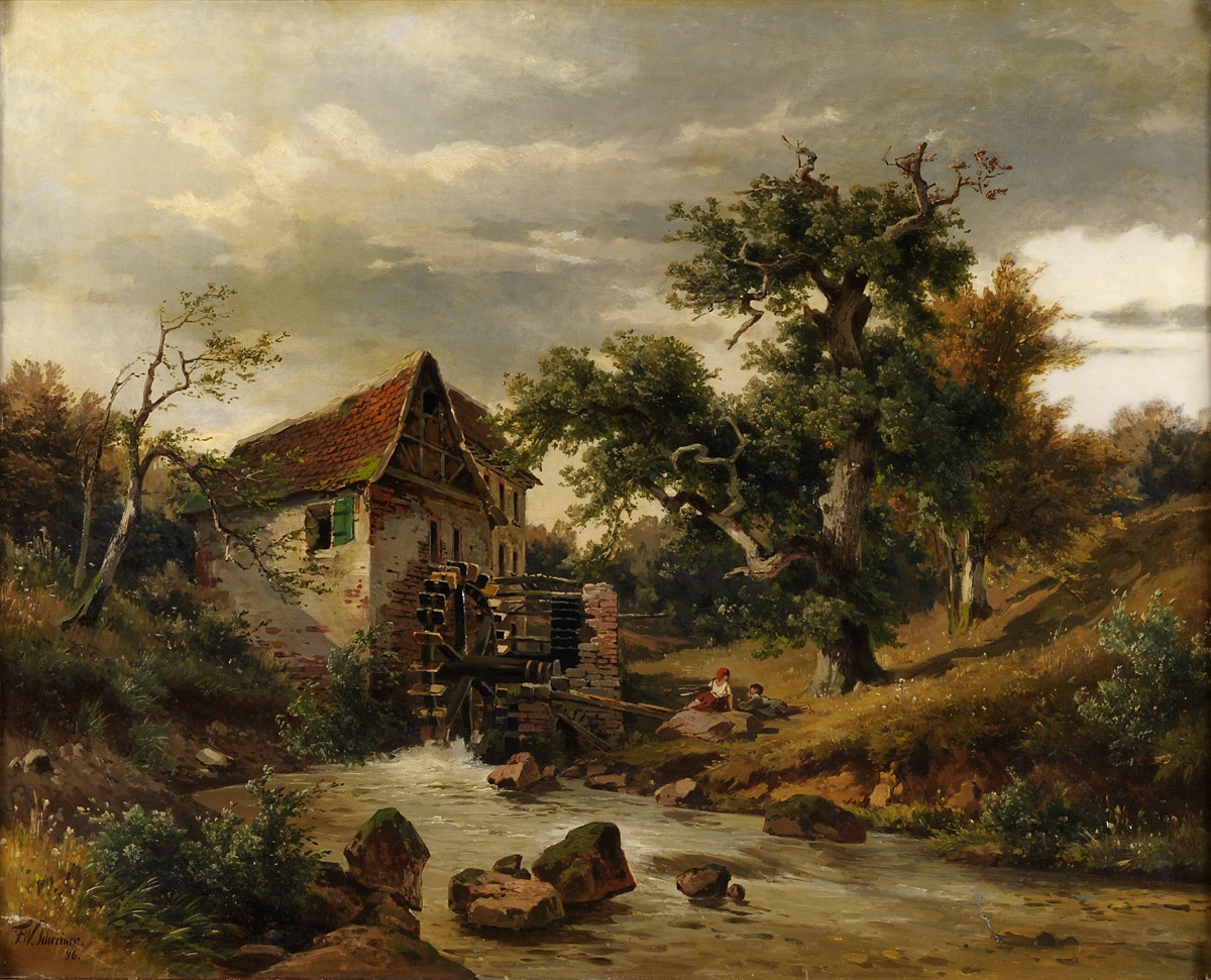 Die alte Wassermühle. Signiert. Datiert (18)96. Öl auf Leinwand, 104 x 129 cm.